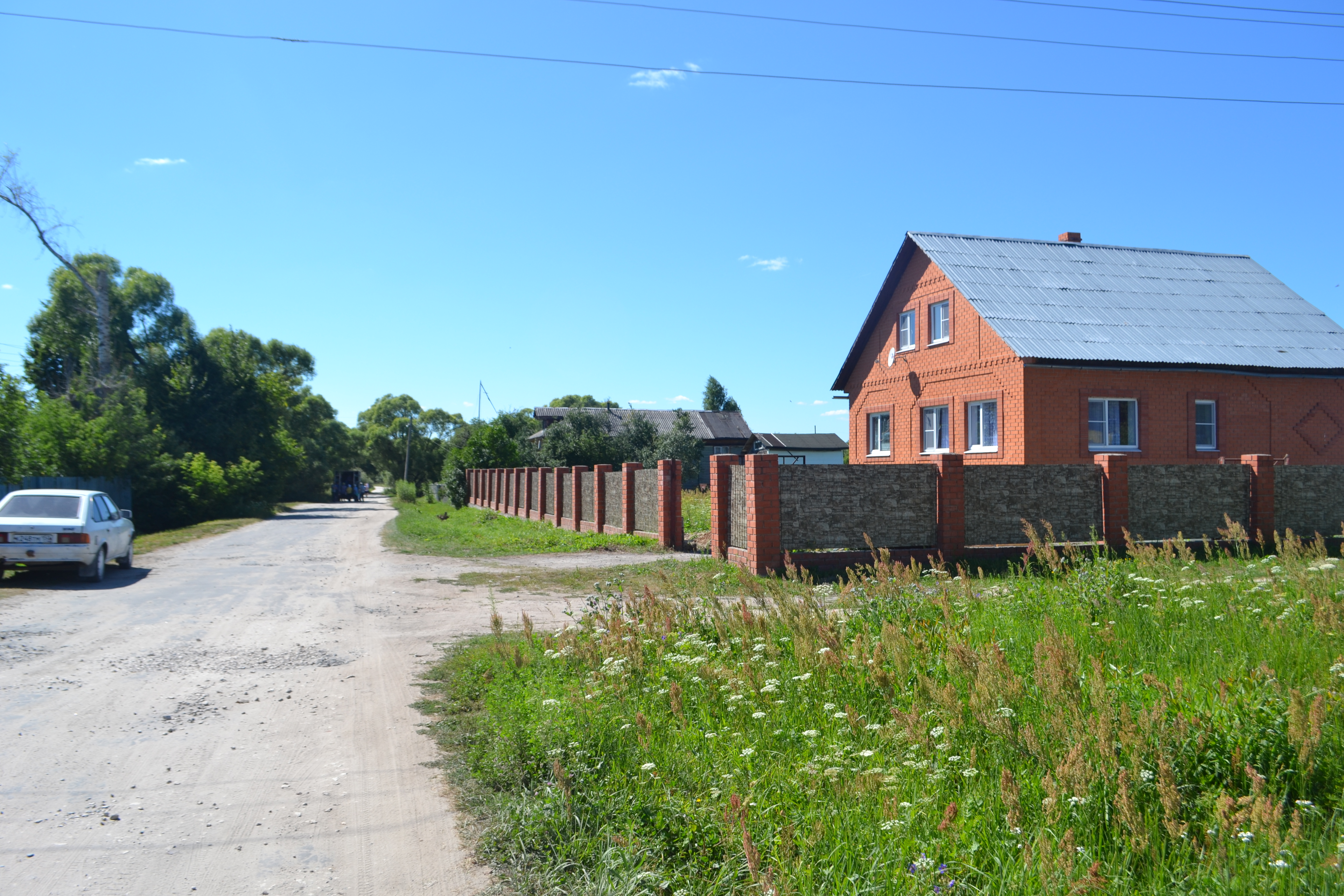 Улица в деревне Филисово (Шатурский район)